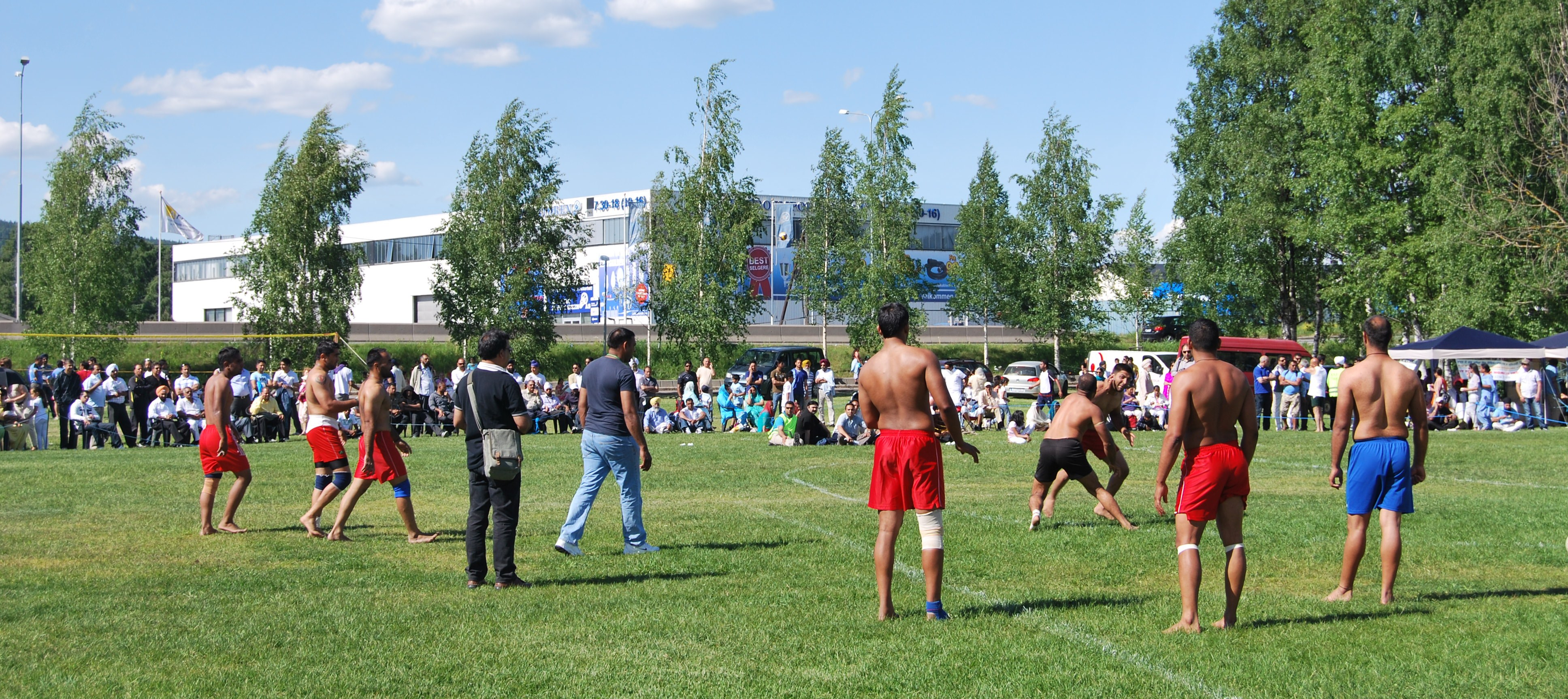 Kabaddi